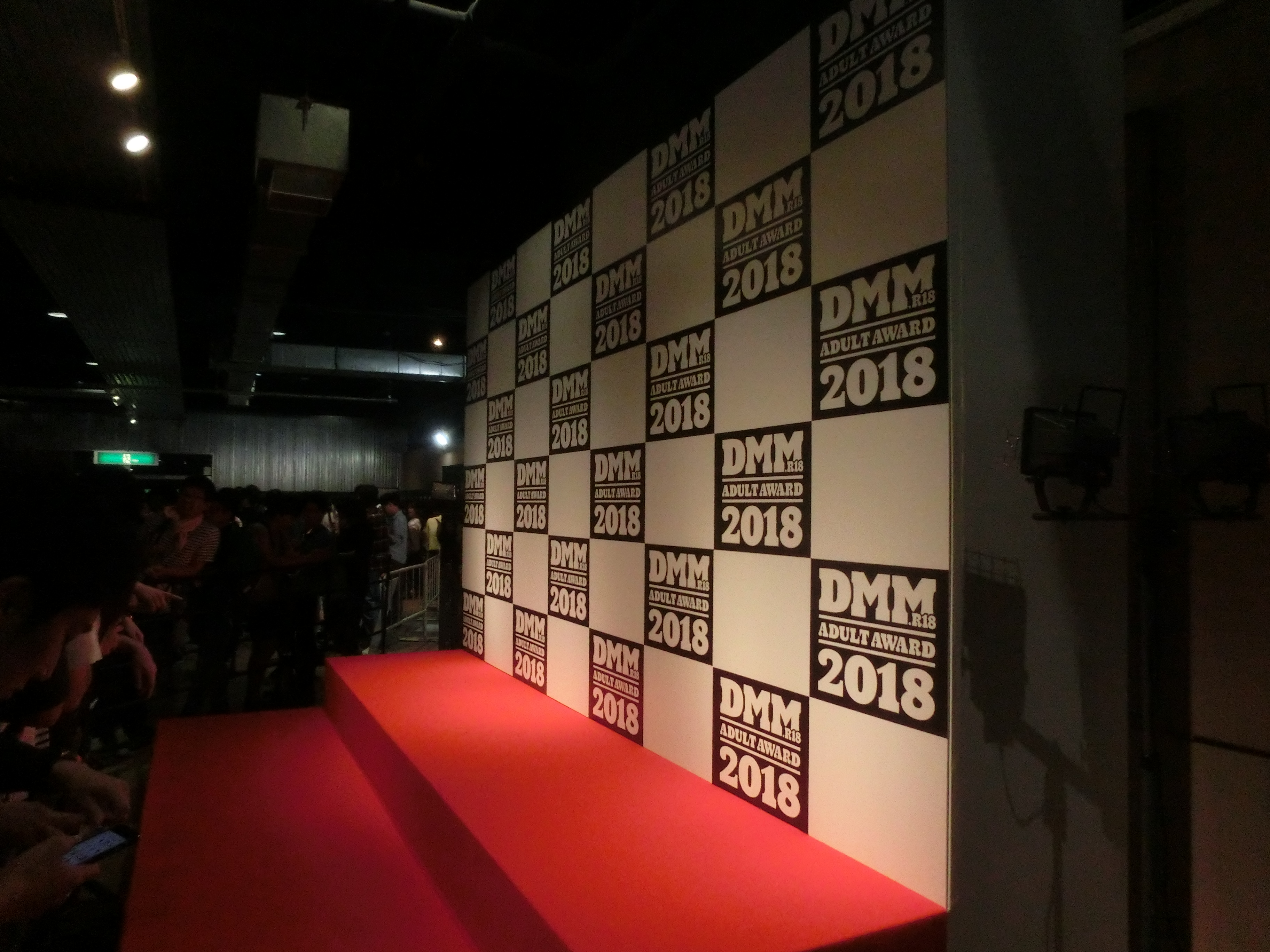 DMMアワード2018